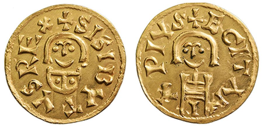 Imitación moderna (¿siglo XX?) de un tremis visigodo de oro acuñado en Egitania durante el reinado de Sisebuto. Leyendas: anverso "+SISIBVTVSREX", reverso "+EGITANIA PIVS". Fuente: Ruth Pliego, La Moneda Visigoda, 2009, 1002. Conservación: EBC+.